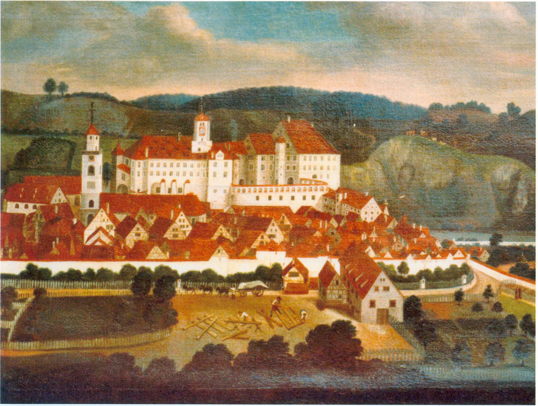 Die Stadt Sigmaringen Mitte des 18. Jahrhunderts von Süden Öl auf Leinwand